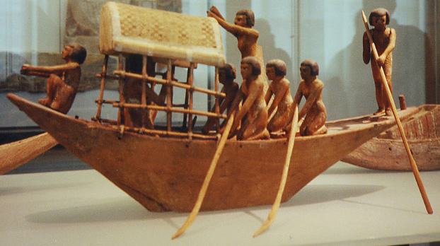 left side